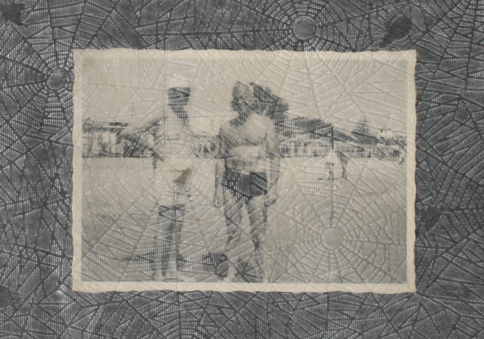 Von Spinnenpapier abgedecktes Foto (1950er Jahre)